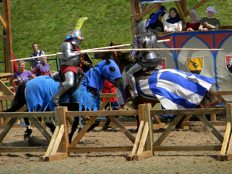 Фестываль Спадчына вякоў у Мірскім замку